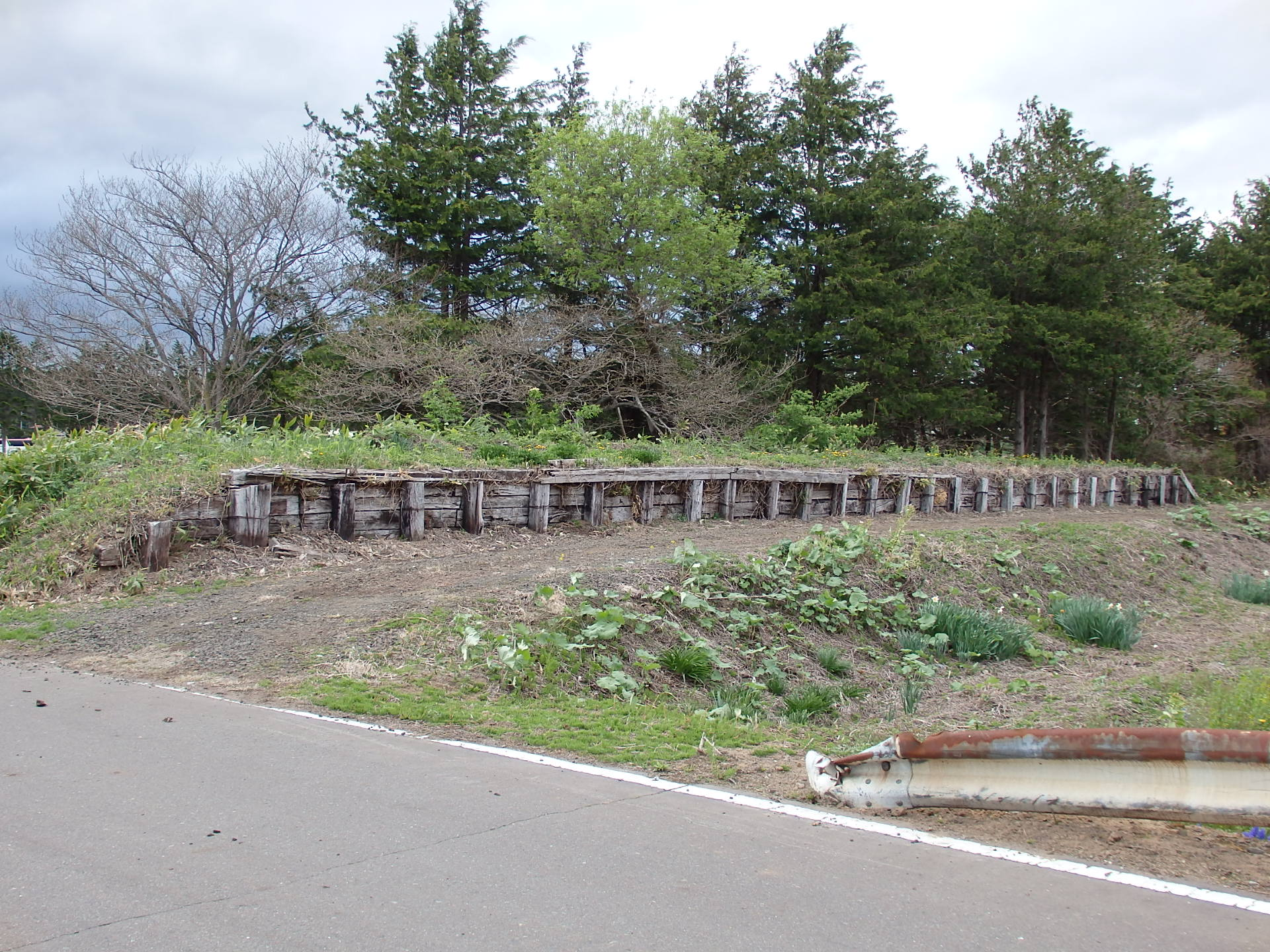 南部縦貫鉄道 旧後平駅跡（2016年5月5日撮影）